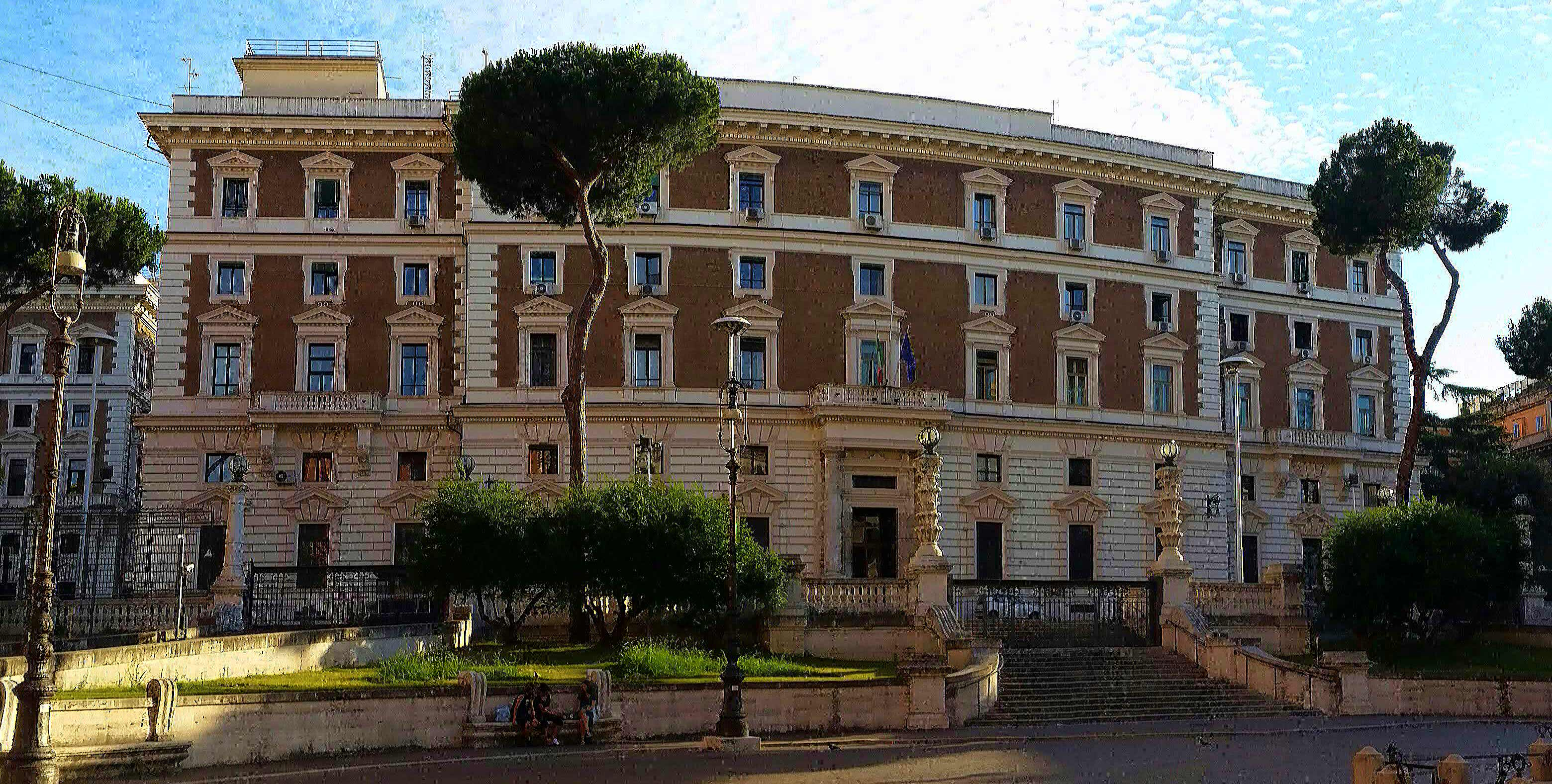 Palazzo del Viminale, Ministero dell'Interno, Roma.